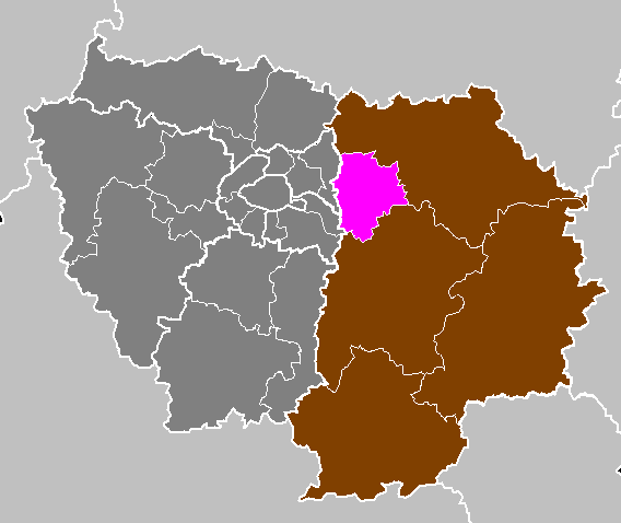 Maps of arrondissements and cantons of France: Département de Seine-et-Marne - Arrondissement de Torcy.PNG (Région Île-de-France)